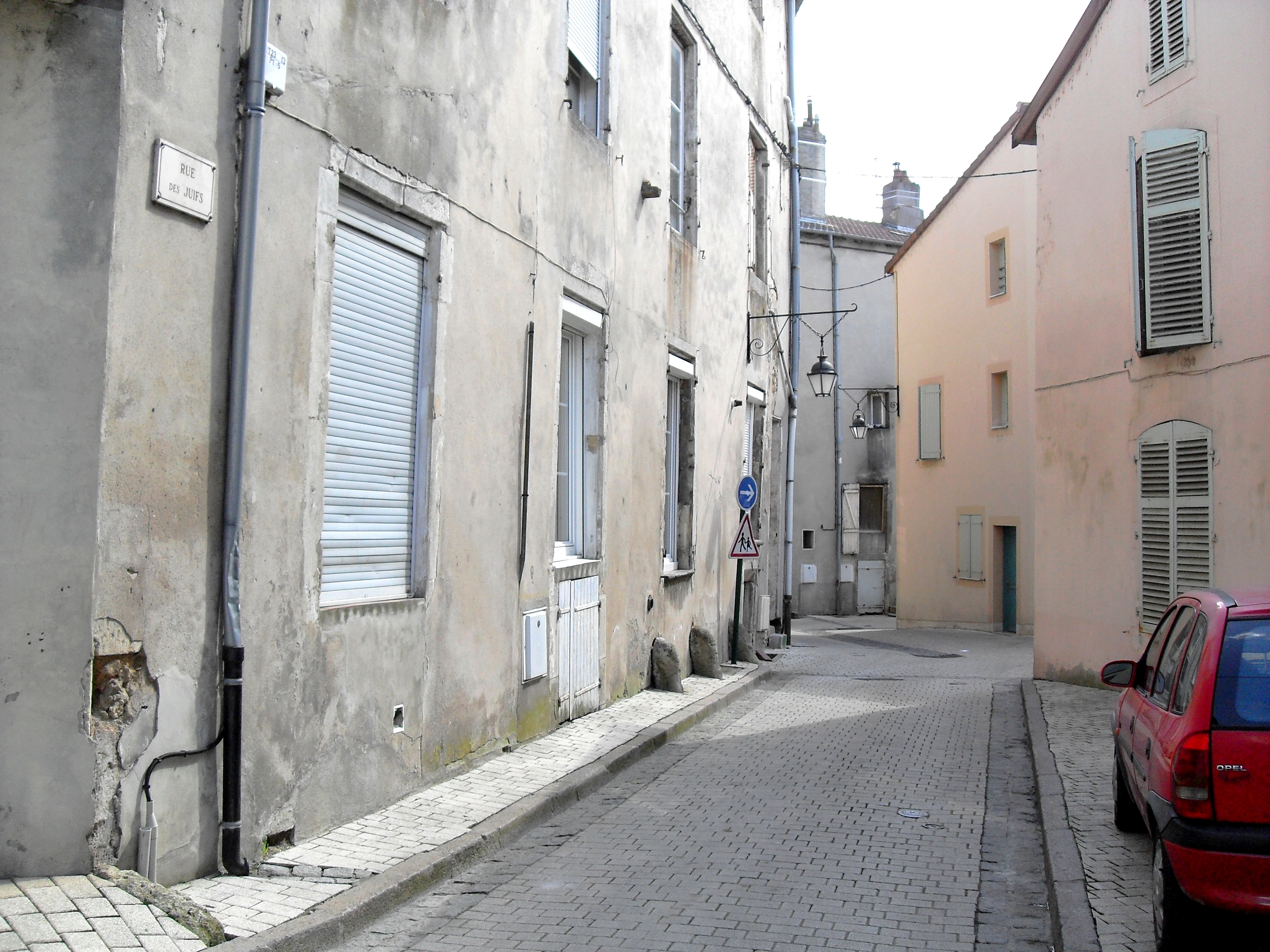 Commercy (Meuse, France) - La Rue des Juifs est une petite ruelle tortueuse près de l'église...